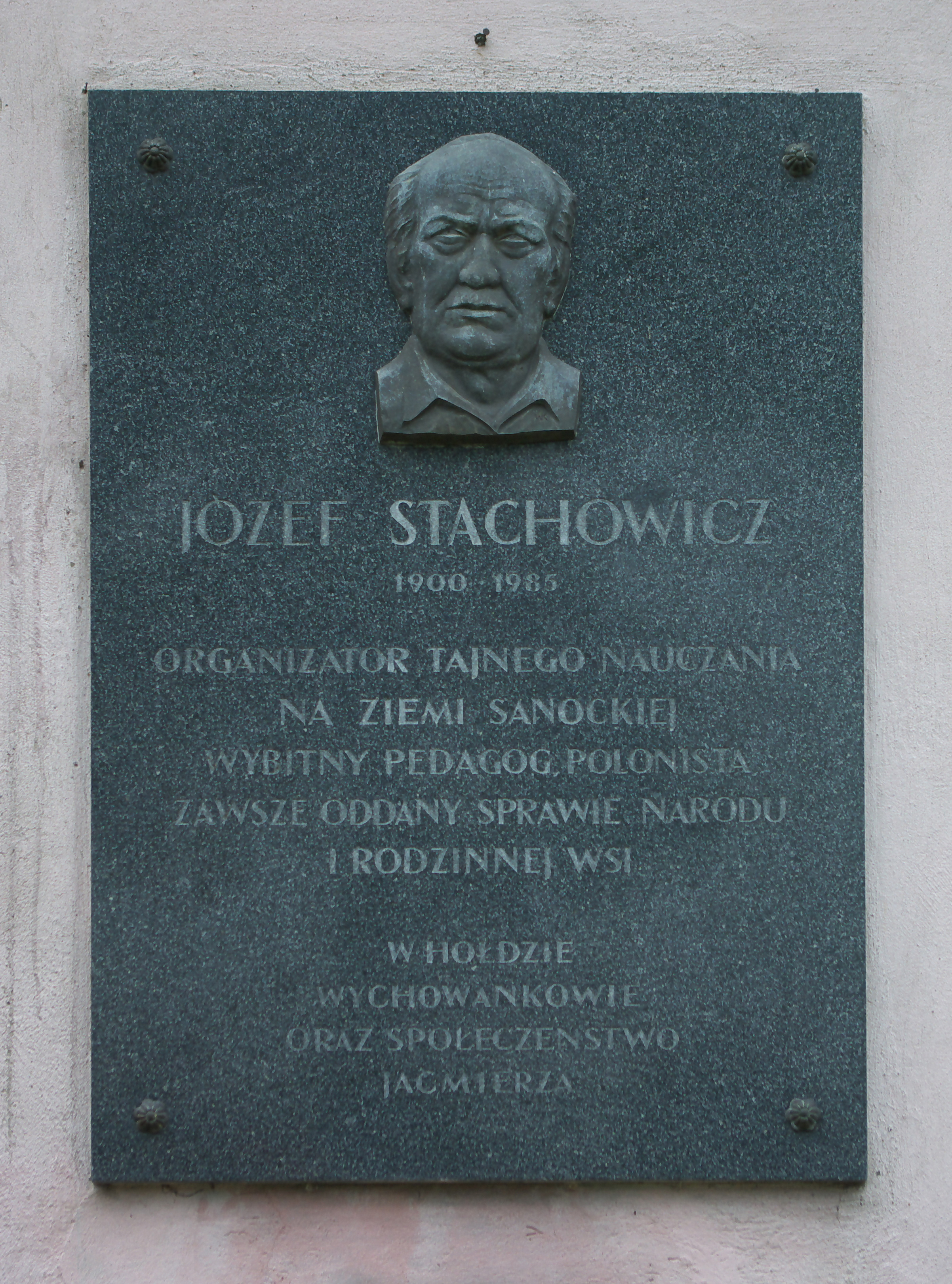 Była szkoła w Jaćmierzu. Obecnie Samorządowe Przedszkole im. Władysława Jagiełły w Jaćmierzu. Tablica poświęcona Józefowi Stachowiczowi